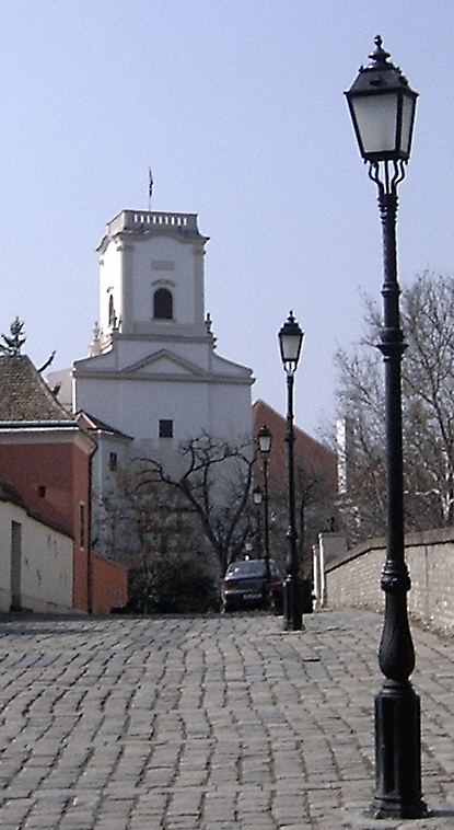 A Püspökvár tornya Győrben (Győr-Moson-Sopron megye)